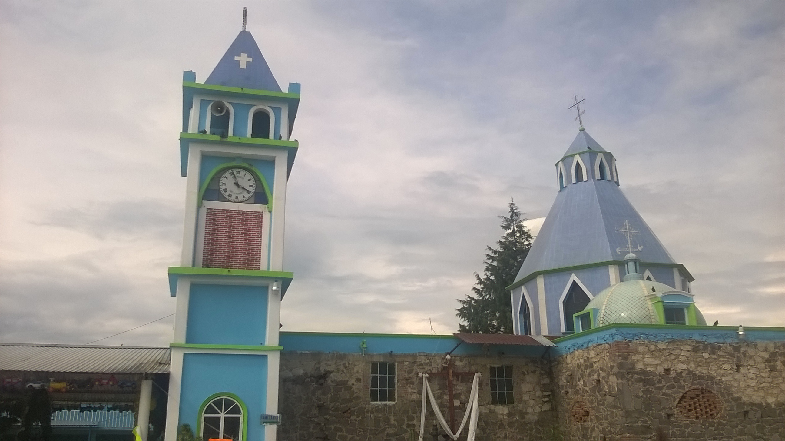 Templo del Niño del Cerrito, Nopalucan, Tlaxcala